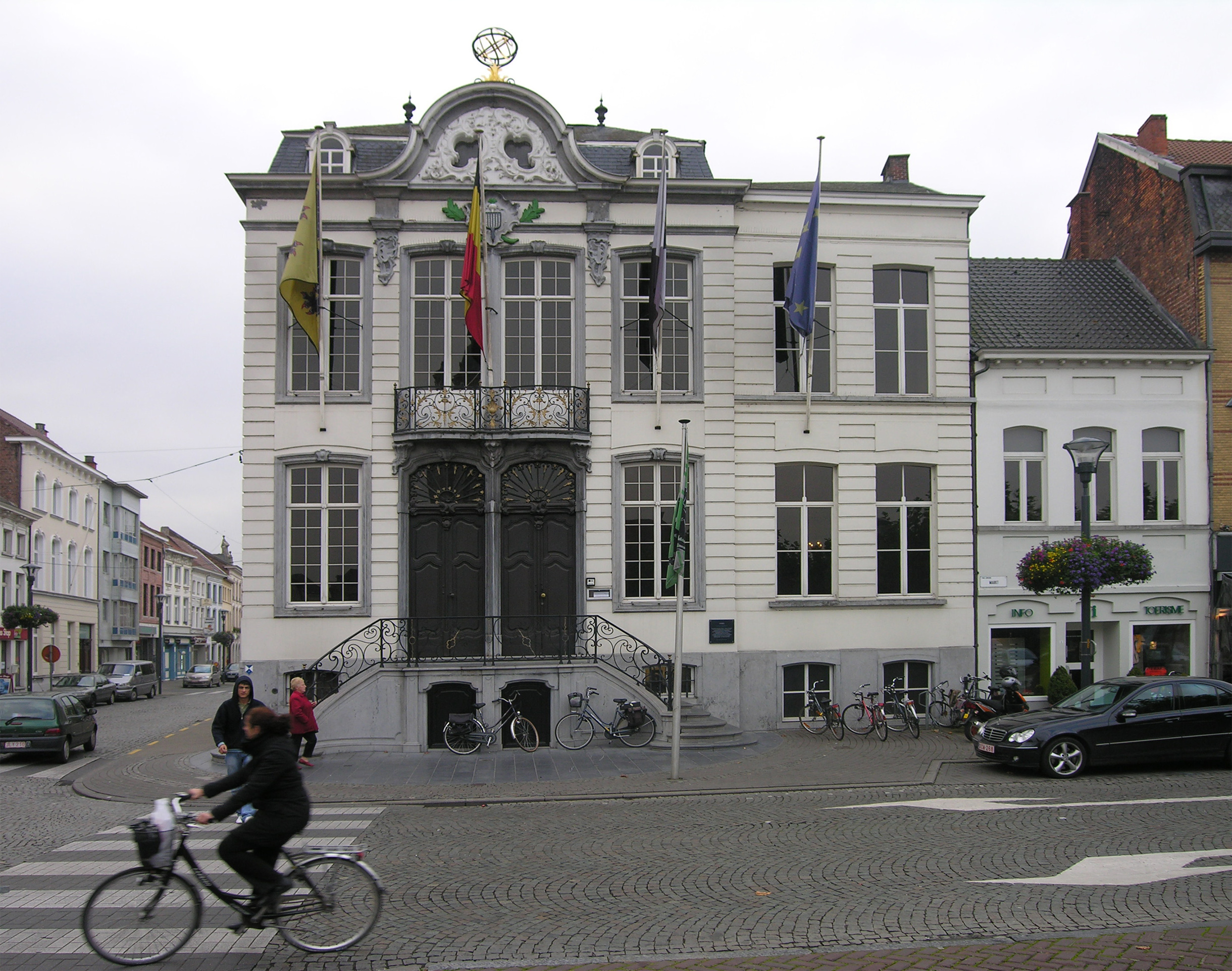 Stadhuis Lokeren